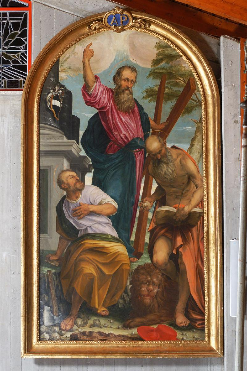 Tipologia dipinto, pala d'altare Misure cm 300.0x134.0 (HxL) Datazione secolo XVI (1597) Autore Quecchi Gaspare, Narvesa Gaspare, ambito friulano Materia e tecnica olio su tela Soggetto Sant'Andrea apostolo